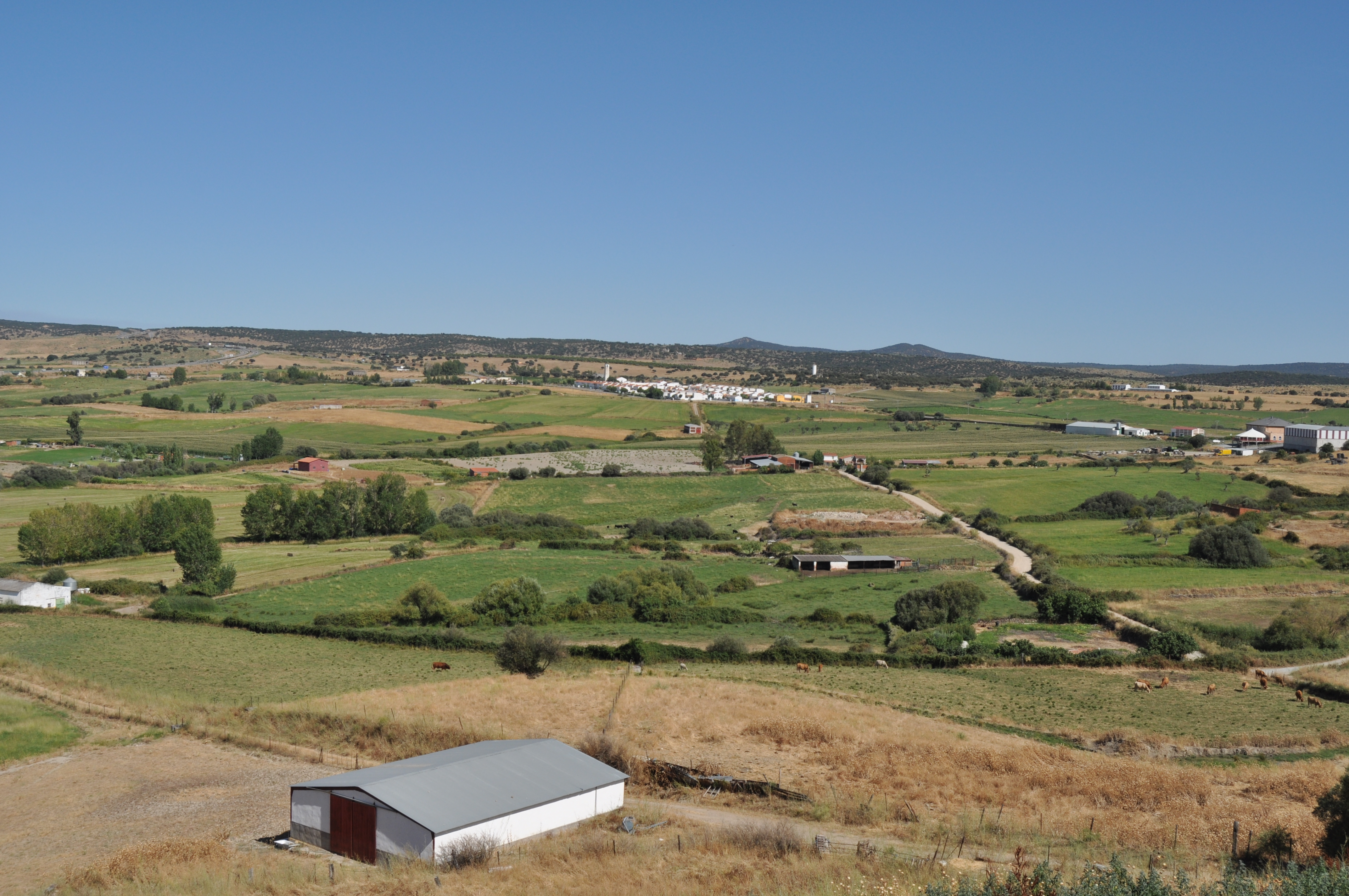 Vista de los campos de los términos municipales de Galisteo y Plasencia, provincia de Cáceres, España. Fotografía tomada desde el Pericutín, rollo de la villa de Galisteo. El pueblo que se ve al fondo es San Gil en el municipio de Plasencia.